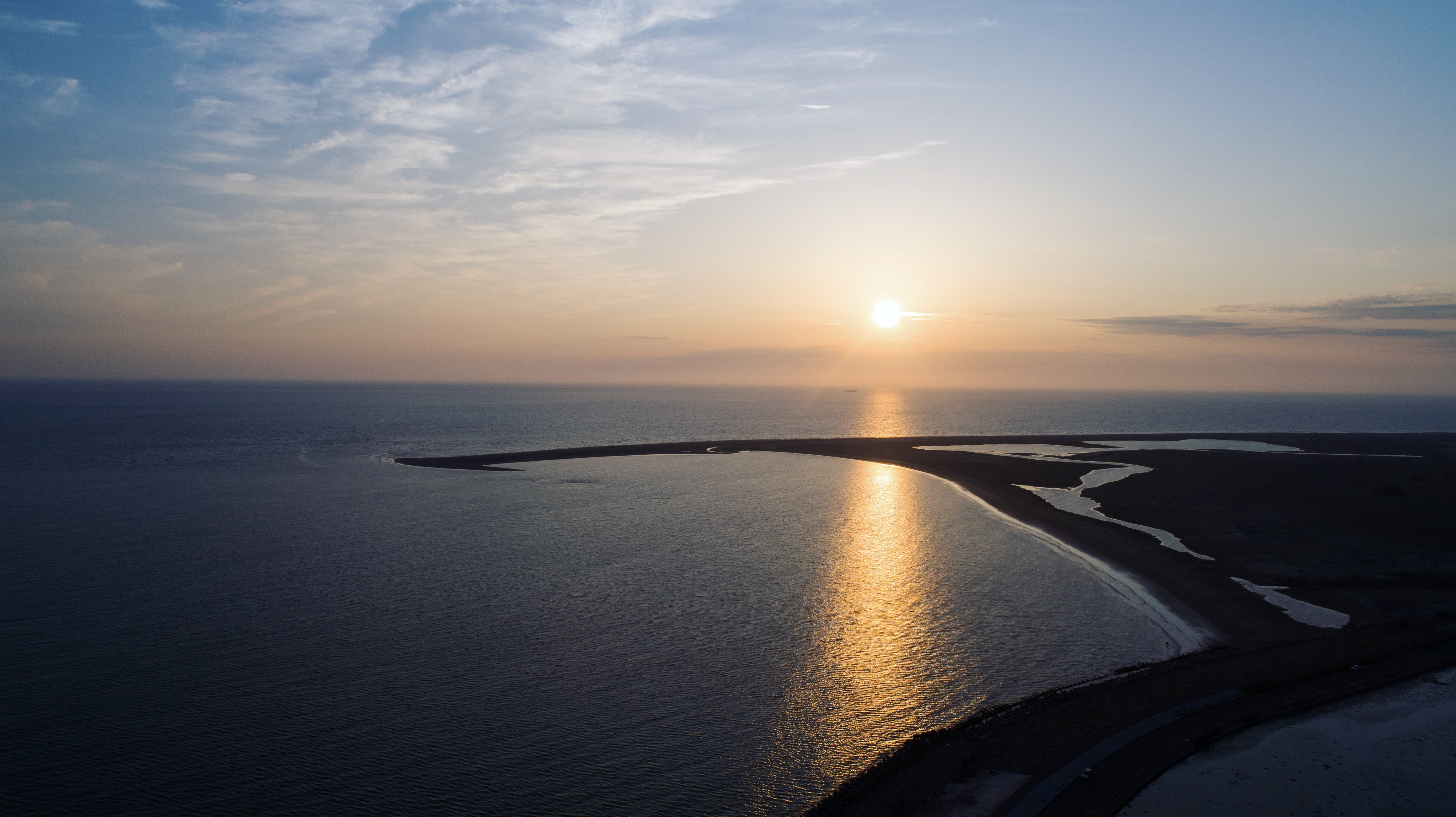 七股區新浮崙汕附近2